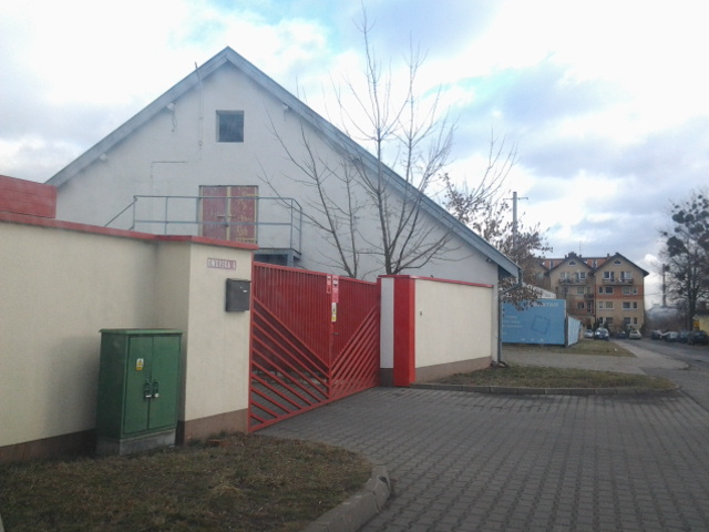 Pozostałości folwarku Naramowice w Poznaniu. ul. Dworska 6.